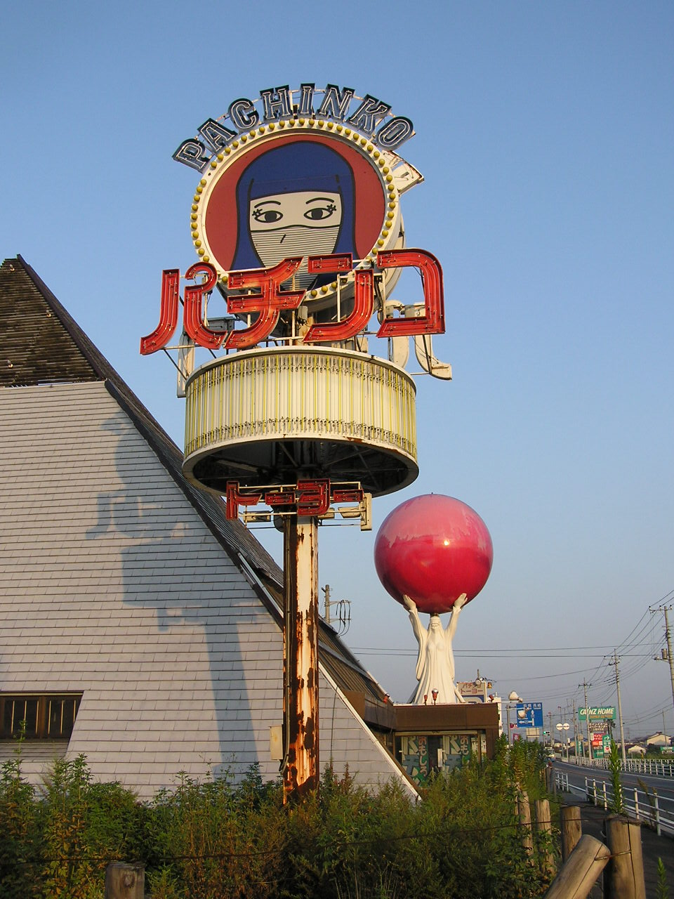 PACHINKO